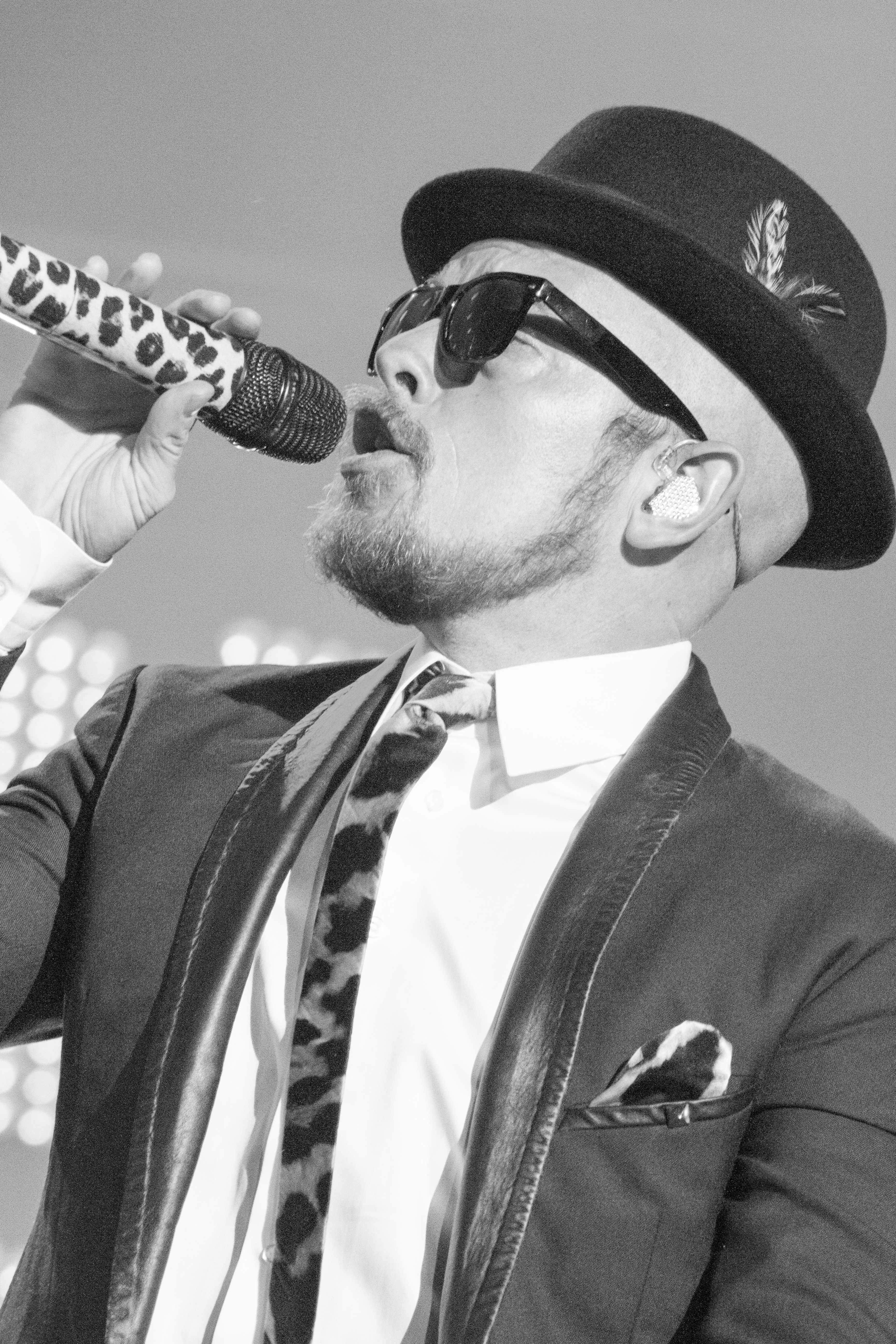 Jan Delay & Disko No. 1 beim Fritz - Die Neuen DeutschPoeten Musikfestival vom 5. September 2015 das in Berlin stattfand.